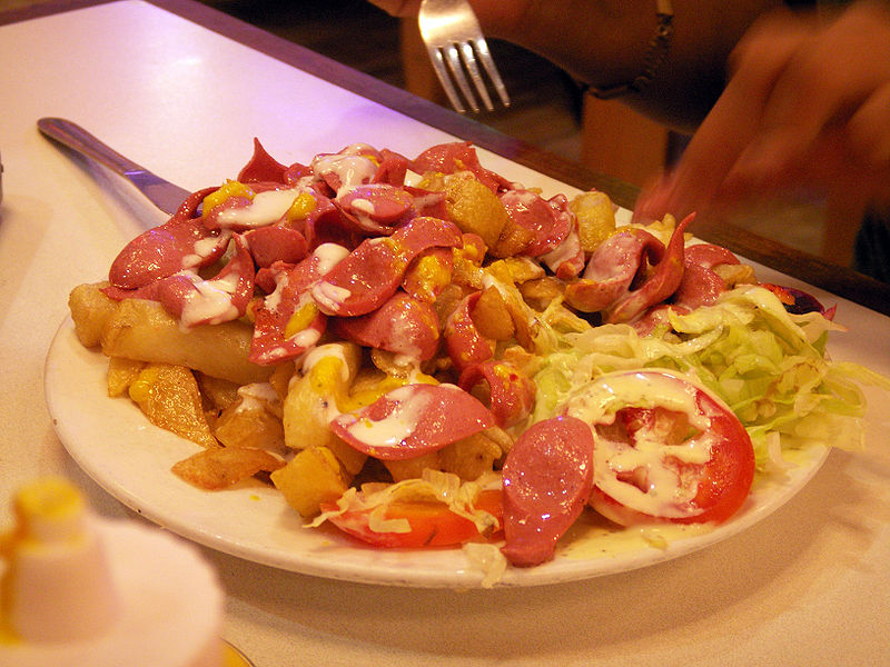 Salchipapas (Potato & sausage) served in Lima, Peru.